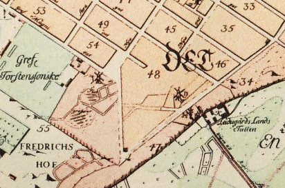 Del av Petrus Tillaeus karta visande Ladugårdslanstullen samt kvarnarna Schultan (y) och Kurckan (z). Norr är till höger.